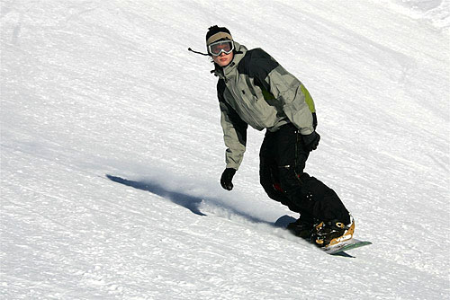 Snowboarder 5